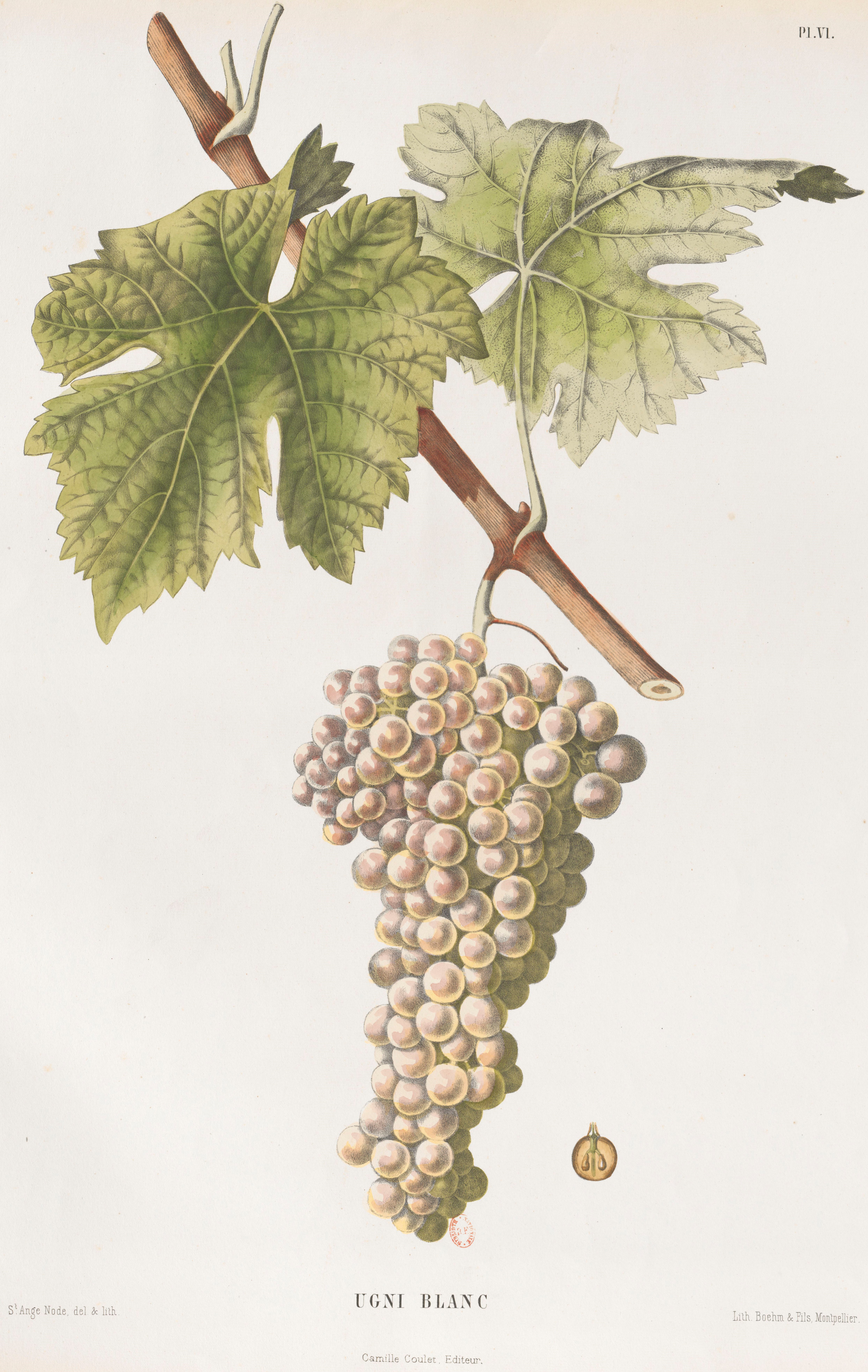 Lithographie du cépage Ugni blanc